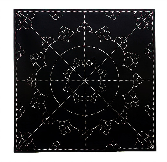 "Oh web" dekoratiivne seinatekstiil Annike Laigo